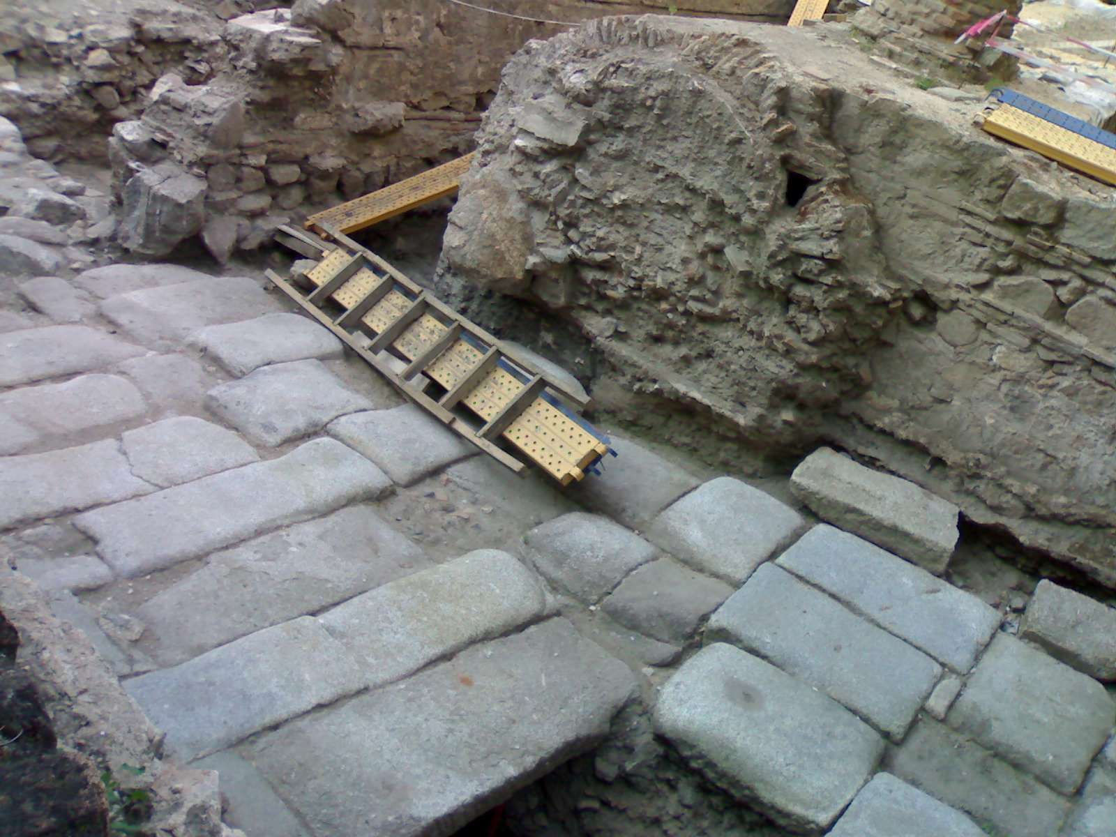 Calzada Romana bajo la Mezquita del Cristo de la Luz